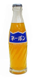 日本版wikipedia「ネーポン初代瓶.jpg」を正立画像に回転修正。 Honwakacap氏による元キャプション「私個人で撮影したネーポンの初代瓶です。 2005年 近村昭夫撮影」